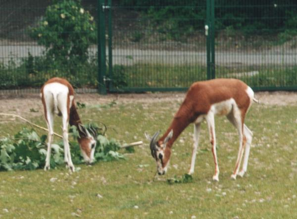 Tierpark Berlin - Mhorr-Gazelle (Gazella dama mhorr)